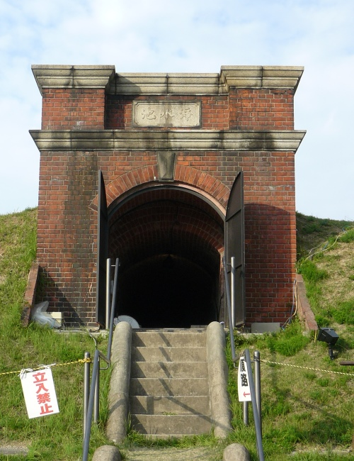 明治43年から約50年間上水道配水池の役割を担ってきた旧天王貯水池。その旧天王貯水池の正面入口は当時の最新建材レンガで作られた凱旋門風。